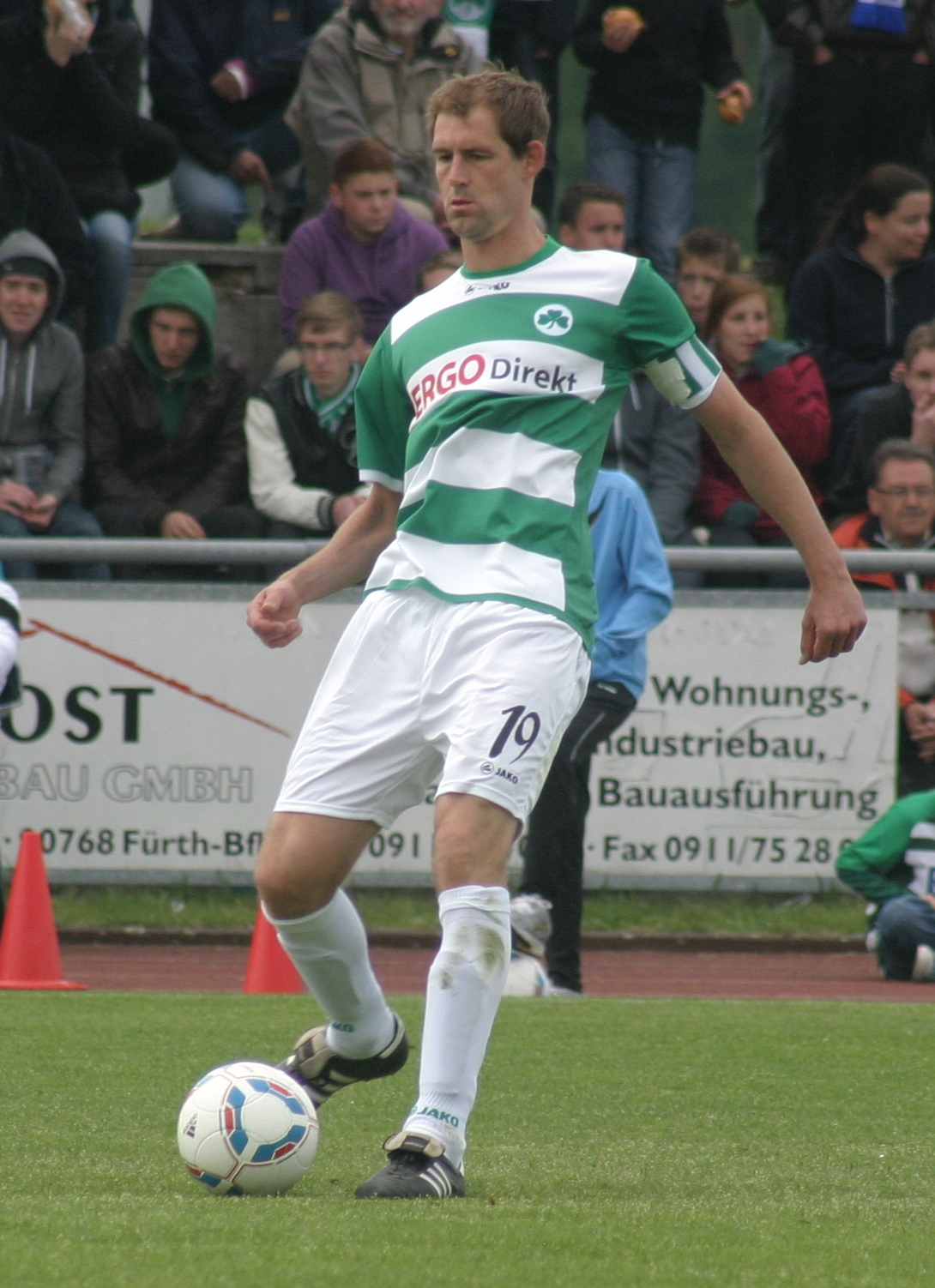 Thomas Kleine